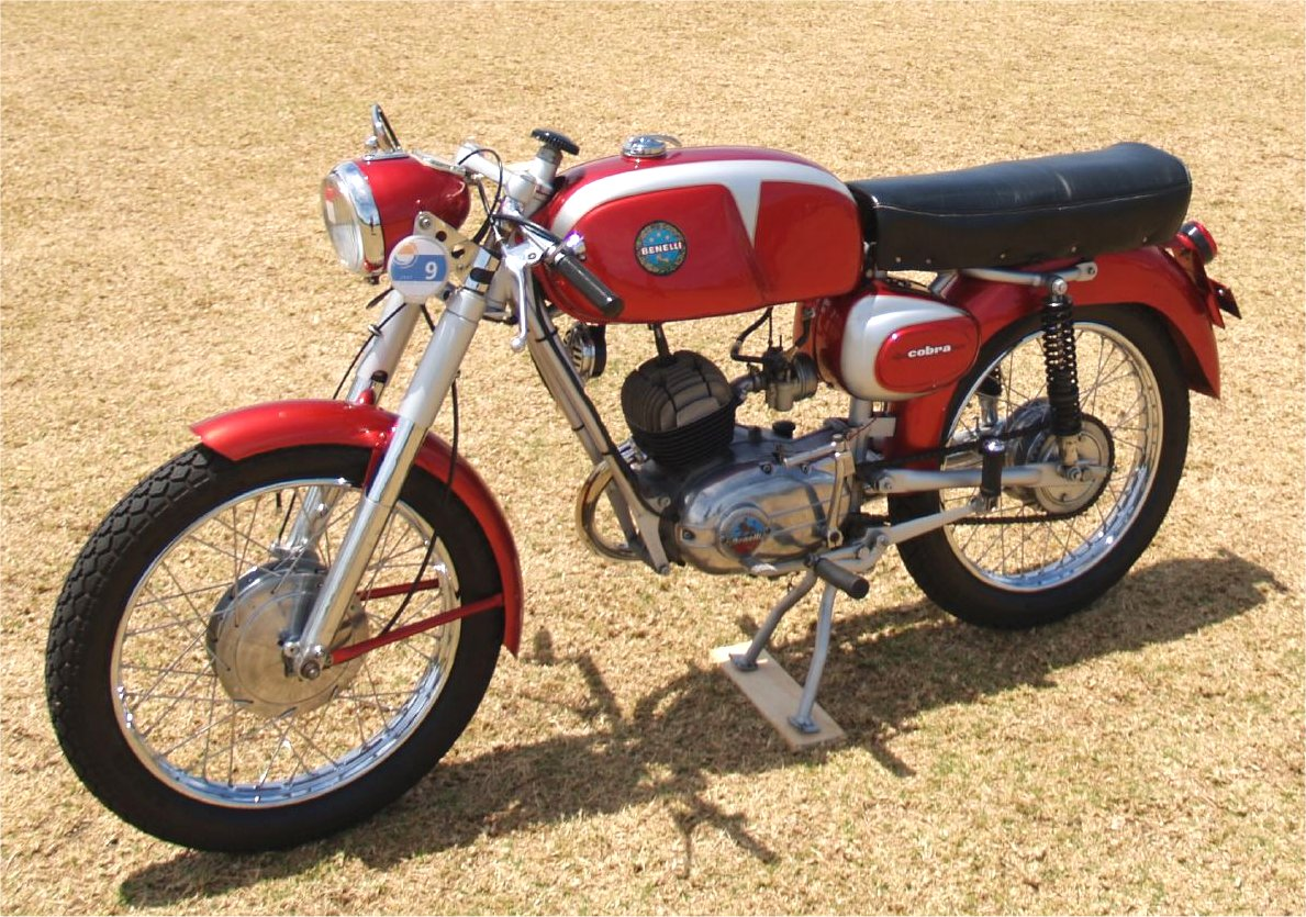 Benelli Cobra 125 del 1965, versione per il mercato statunitense del corrispondente modello europeo Benelli Nuovo Leoncino 125